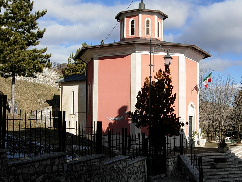 Il tempio dei caduti a Pietransieri Foto personale